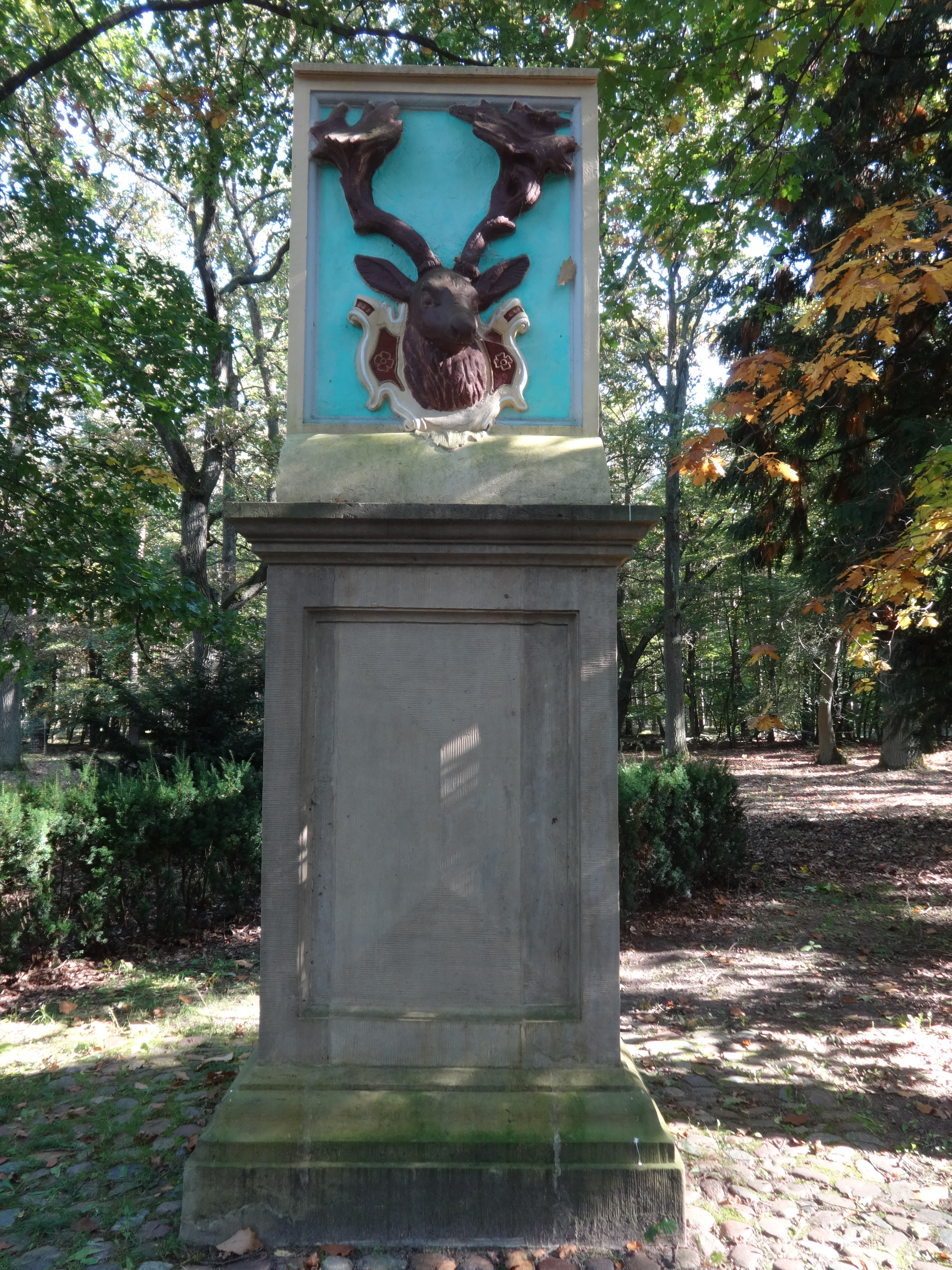 Das Hirsch-Denkmal erinnert an den Abschuss eines 66-Enders durch Friedrich I. von Preußen am 18. September 1696. Es steht an einer Verbindungsstraße, die von Briesen (Mark) im Landkreis Oder-Spree nach Kersdorf führt.